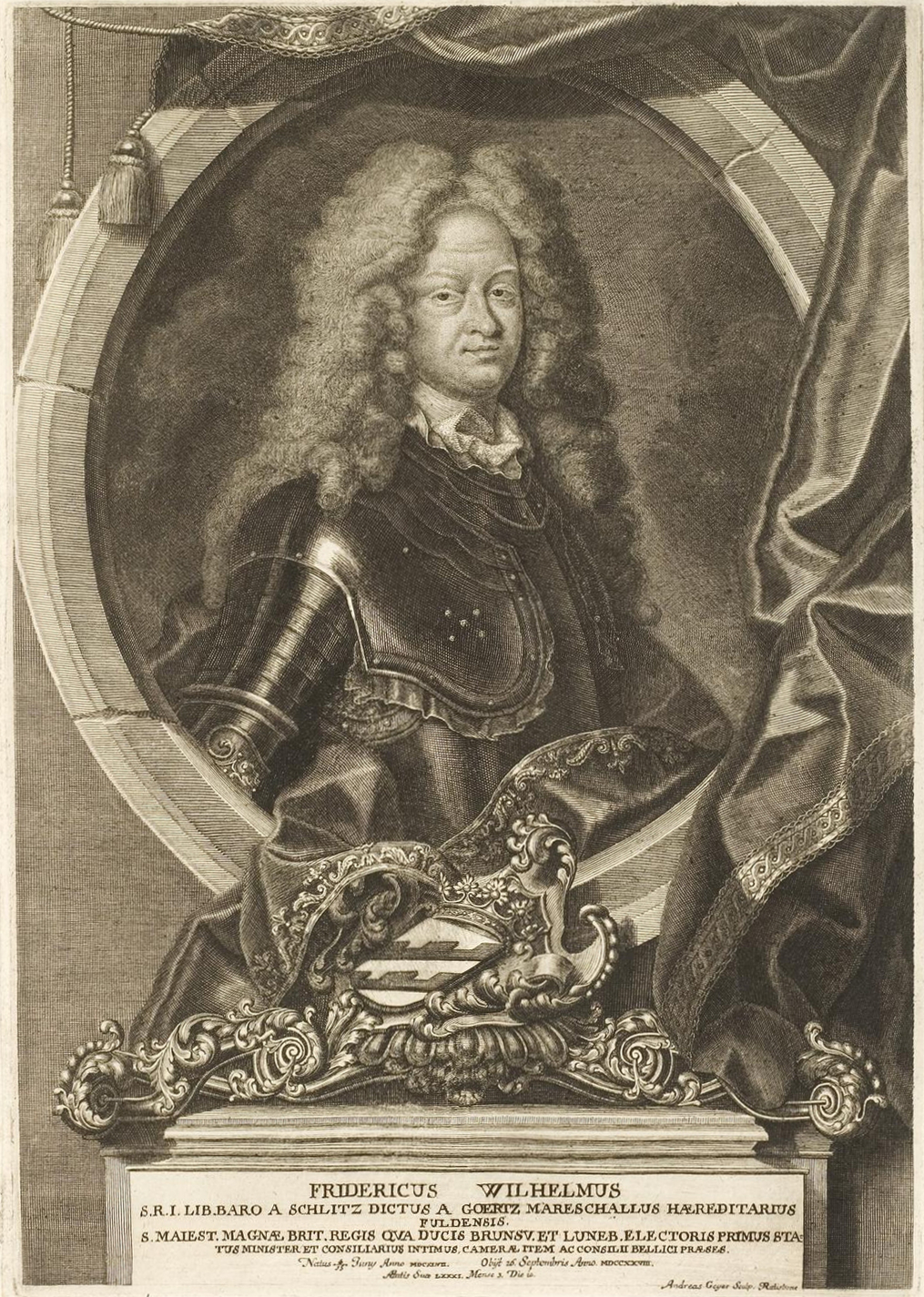 Grafik aus dem Klebeband Nr. 1 der Fürstlich Waldeckschen Hofbibliothek Arolsen Motiv: Friedrich Wilhelm von Schlitz, Geheimrat und kurfürstlich braunschweig-lüneburgischer Kammerpräsident